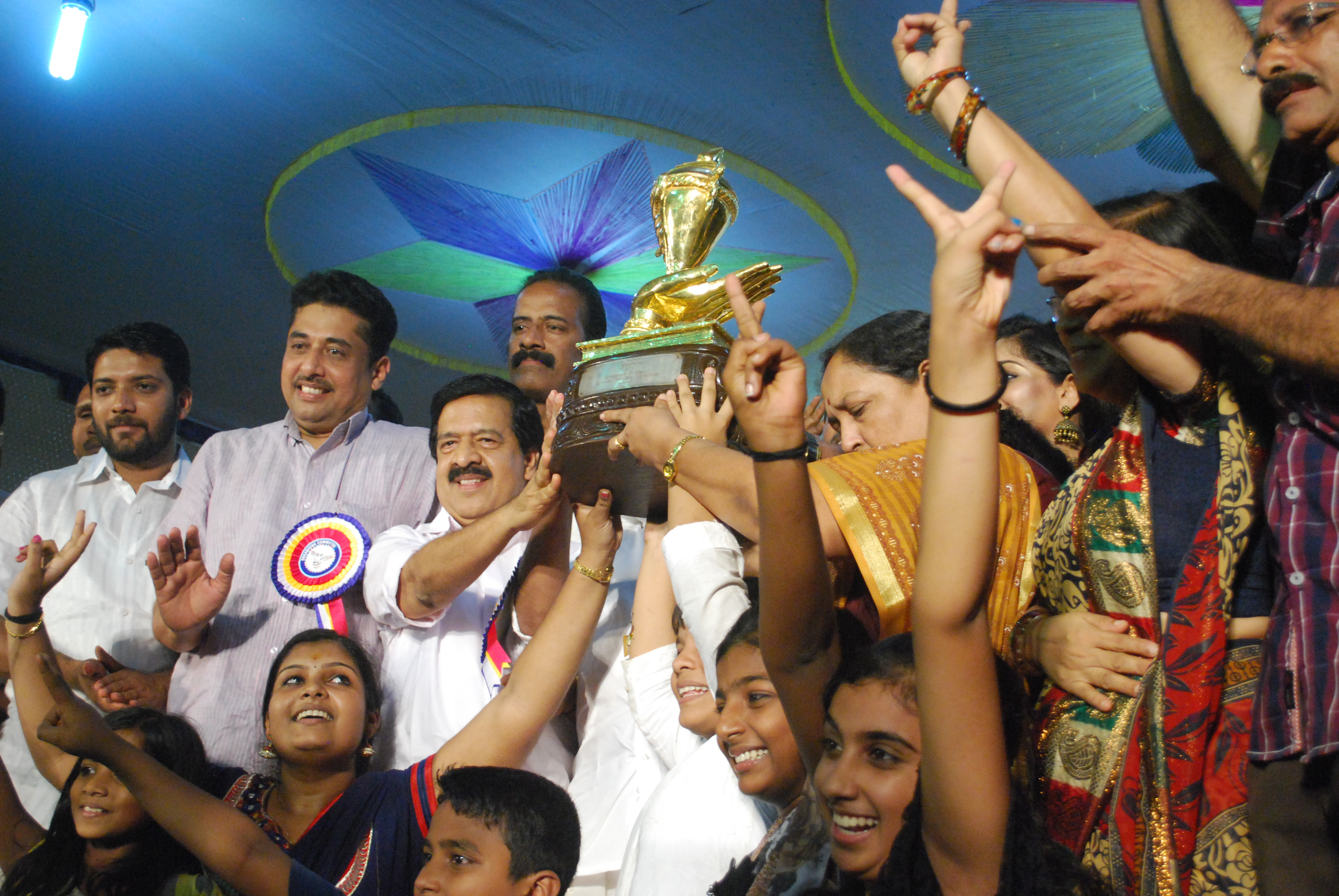 അമ്പത്തിനാലാം കേരള സ്കൂള് കലോല്സവം 2014,പാലക്കാട്. കൂടുതല് പോയന്റുകള് നേടി സ്വര്ണ്ണകപ്പ് നിലനിര്ത്തിയ കോഴിക്കോട് ജില്ലക്ക് സ്വര്‍ണ്ണകപ്പ് സമ്മാനിക്കുന്നു.